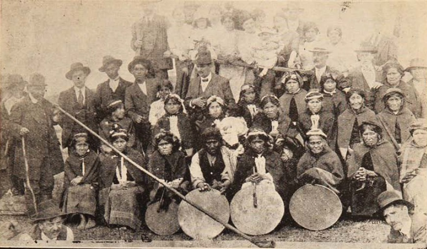 "Una banda de músicos araucanos con sus instrumentos y algunos curiosos que fueron a una fiesta indígena en los alrededores de Temuco"